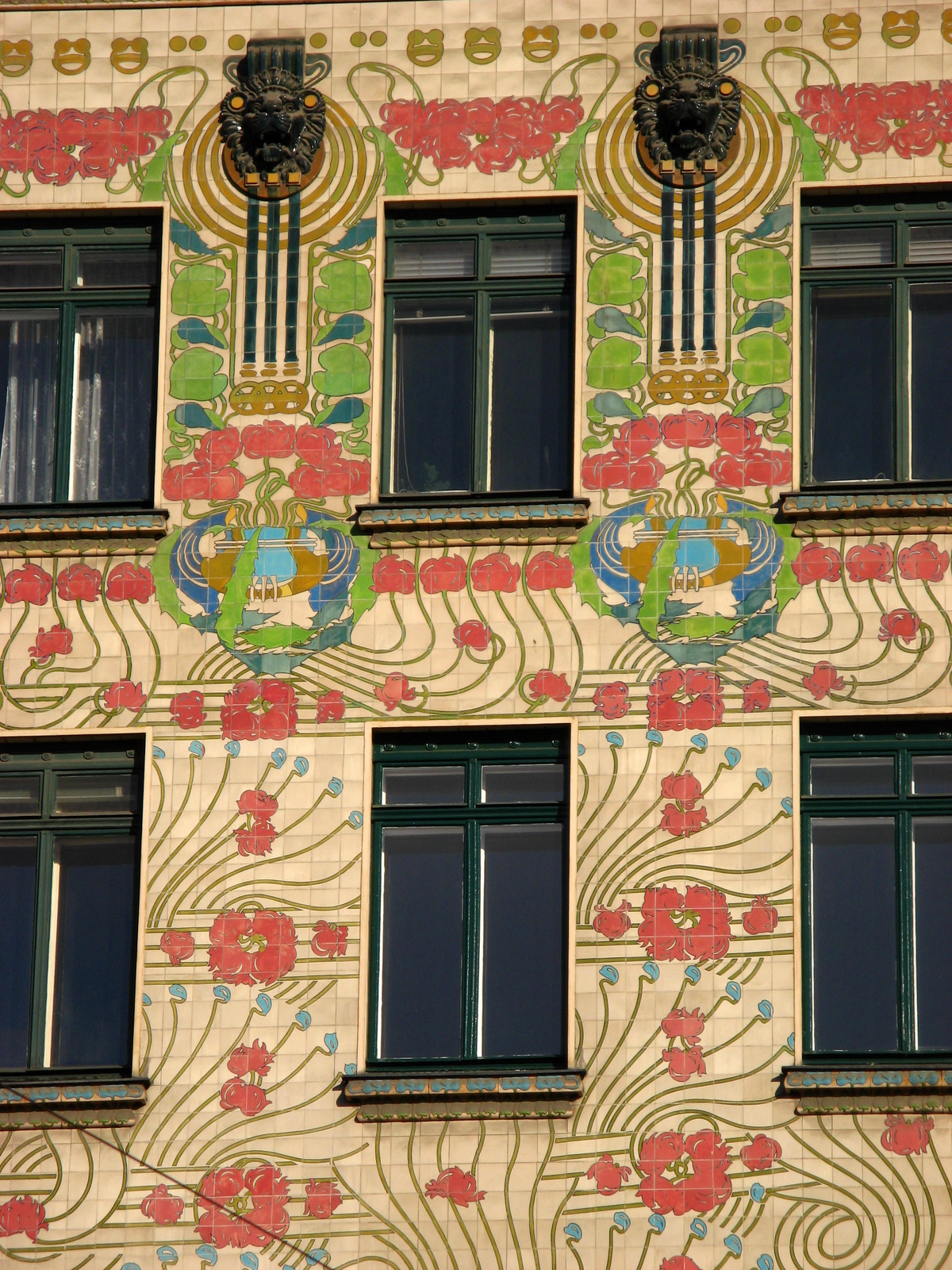 Vienna